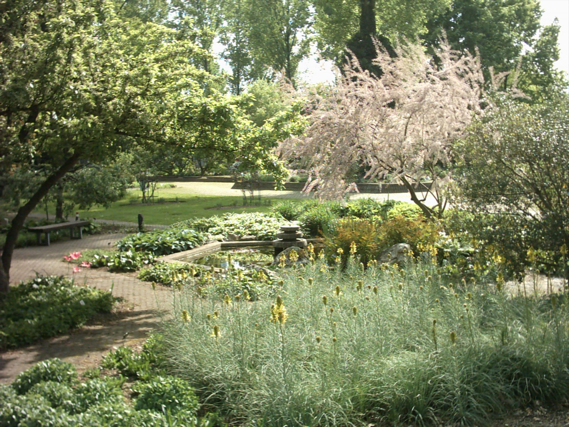 Teich im botanischen Garten Düsseldorf.